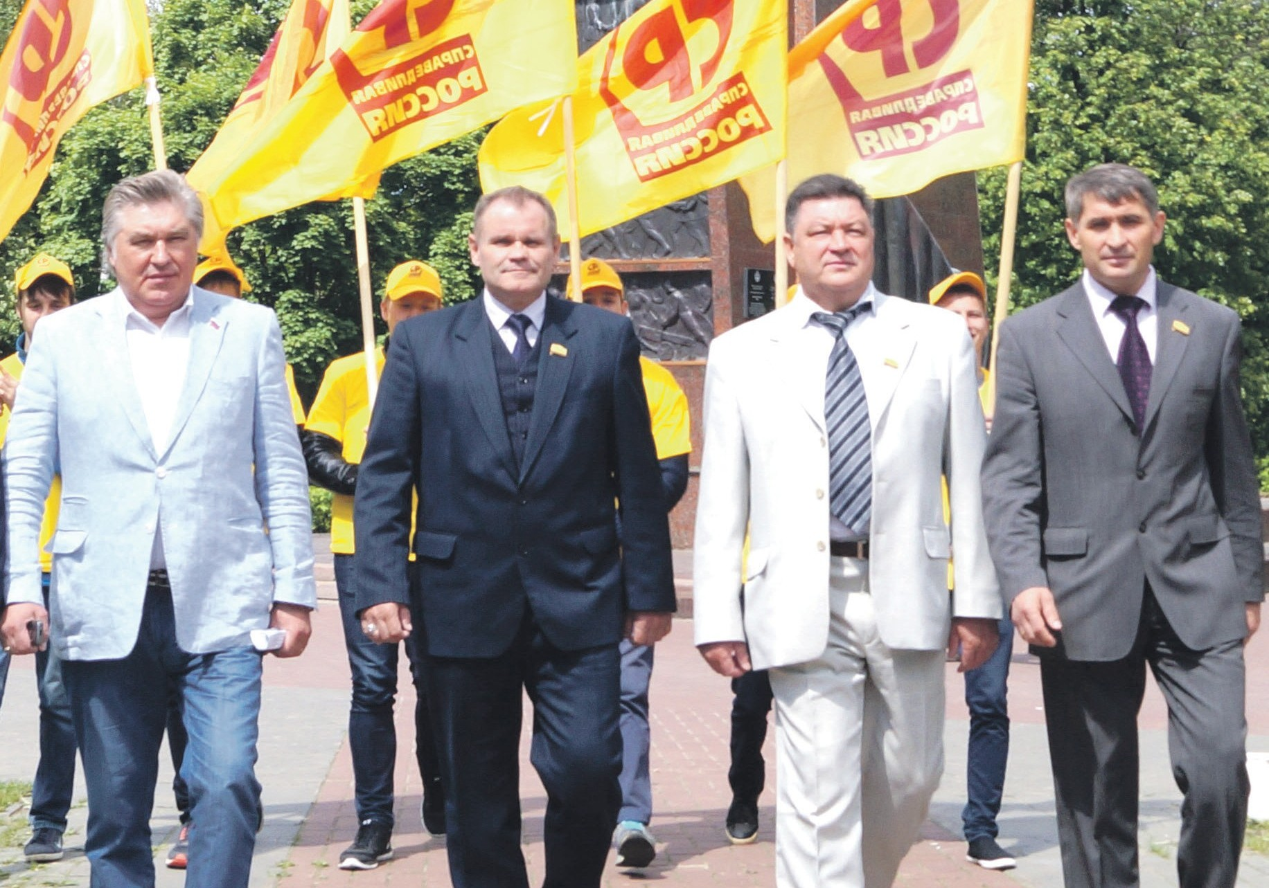 Справедливая Россия в Чувашской Республики, команда Олега Николаева